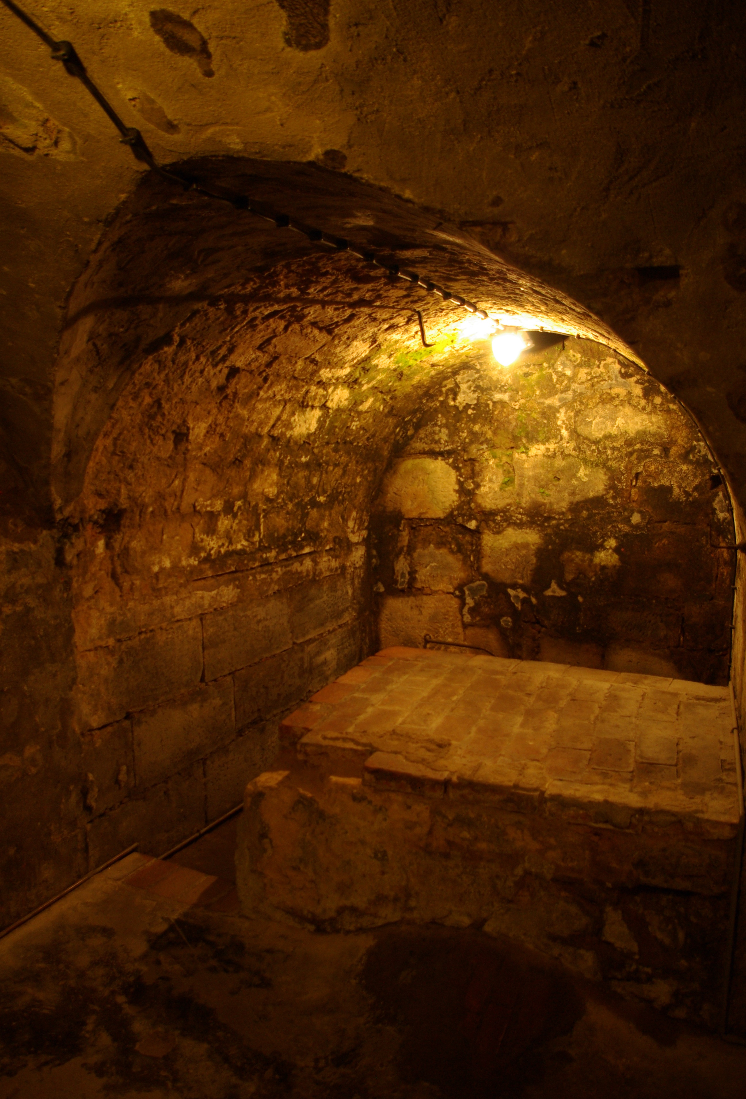 Treppe zur ehemaligen Mikwe im Gebäude des Jüdischen Museums Franken in Fürth